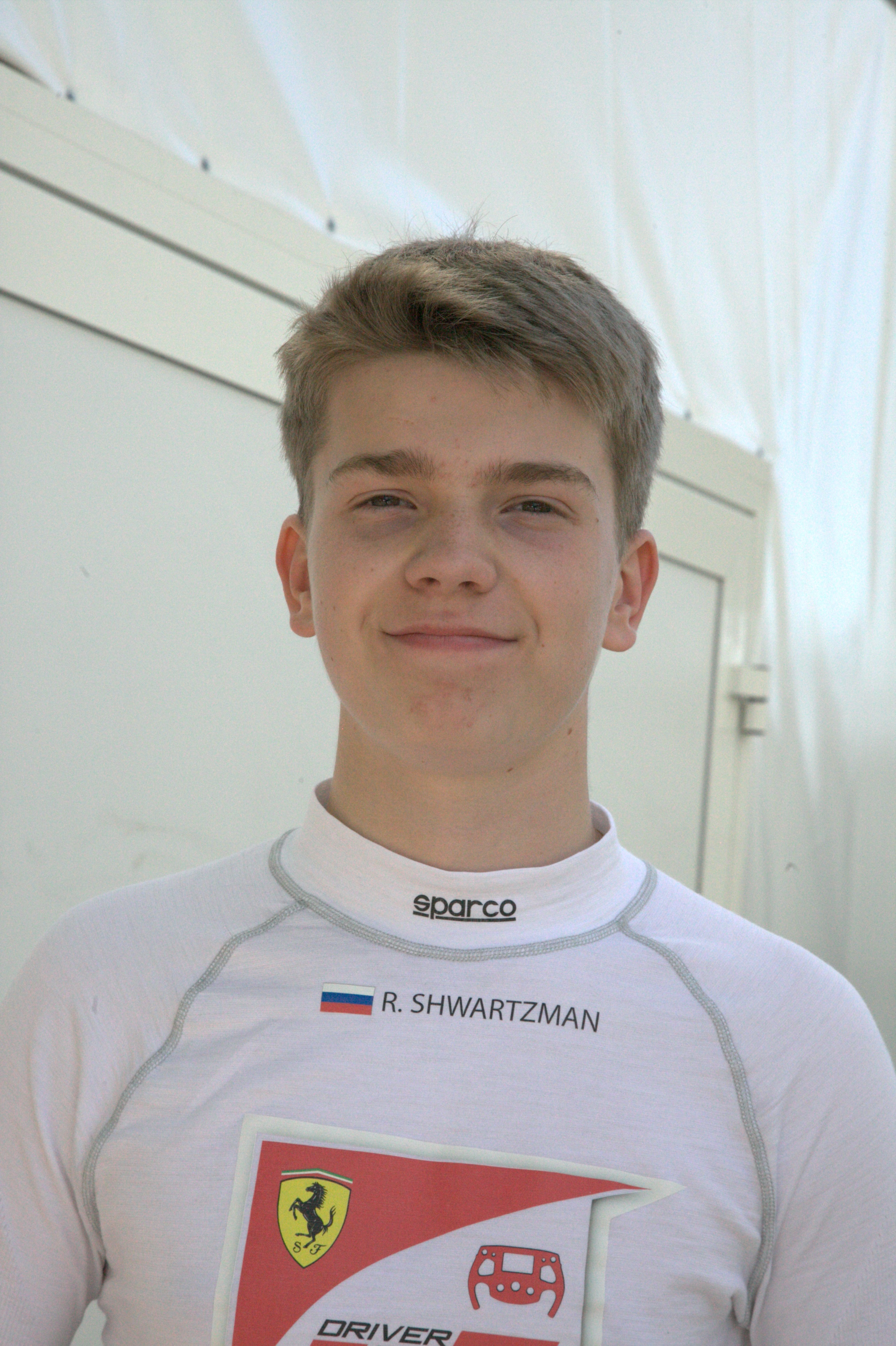 Роберт Шварцман (род. 1999) — российский автогонщик